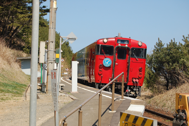 有家駅に入線する「うみねこ号」